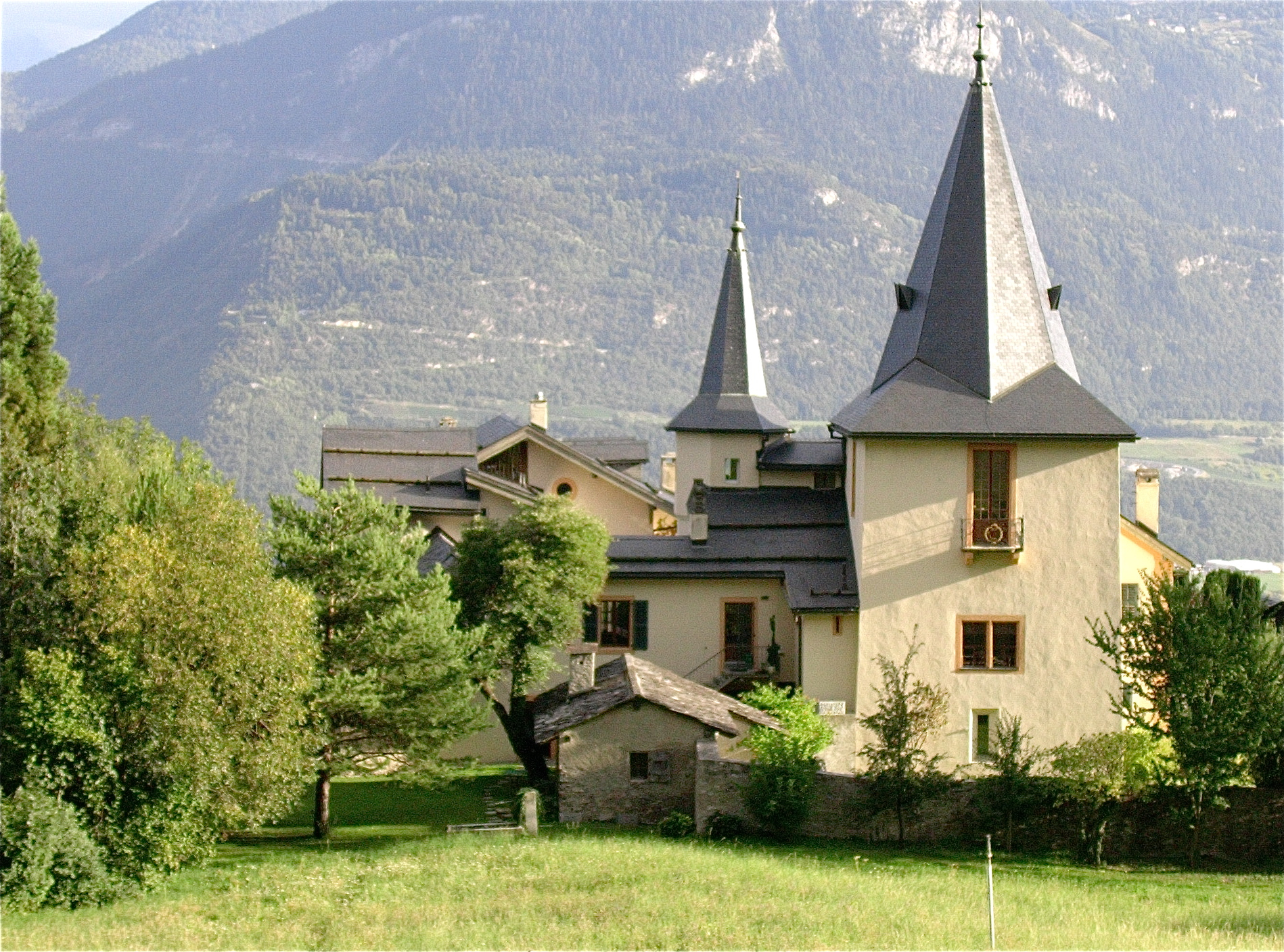 Une vue du Château d'Anchette